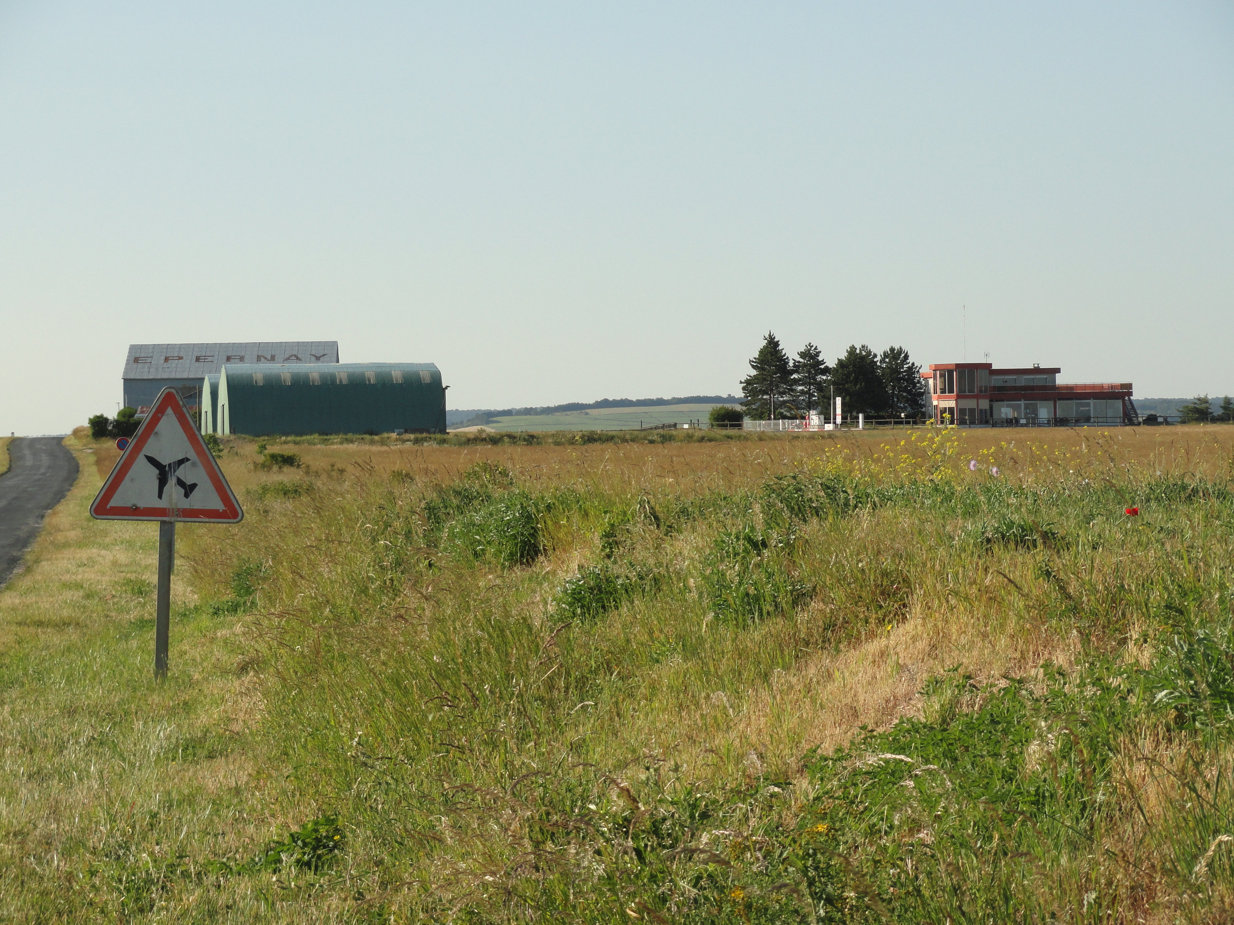 Vue de l'aérodrome de Plivot depuis la D337 .